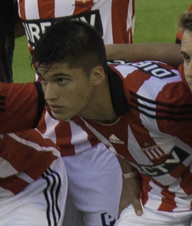 Estudiantes de La Plata starting XI against Penarol in Copa Sudamericana 2014.